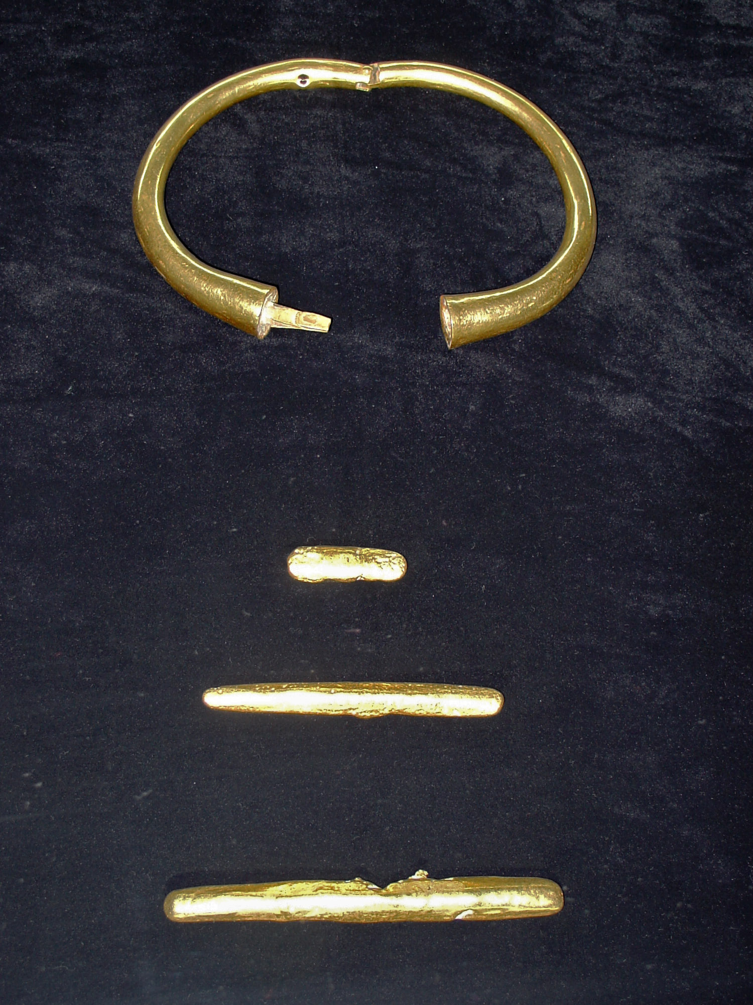 Pièces d'orfèvrerie présentées au musée archéologique de Varna (Bulgarie) et qui seraient parmi les objets en or les plus anciens connus à ce jour (- 6000 ans avant JC)